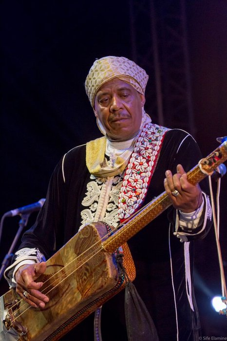 Maalem Mustapha Baqbou à la scène de la Plage au festival Gnaoua en 2016